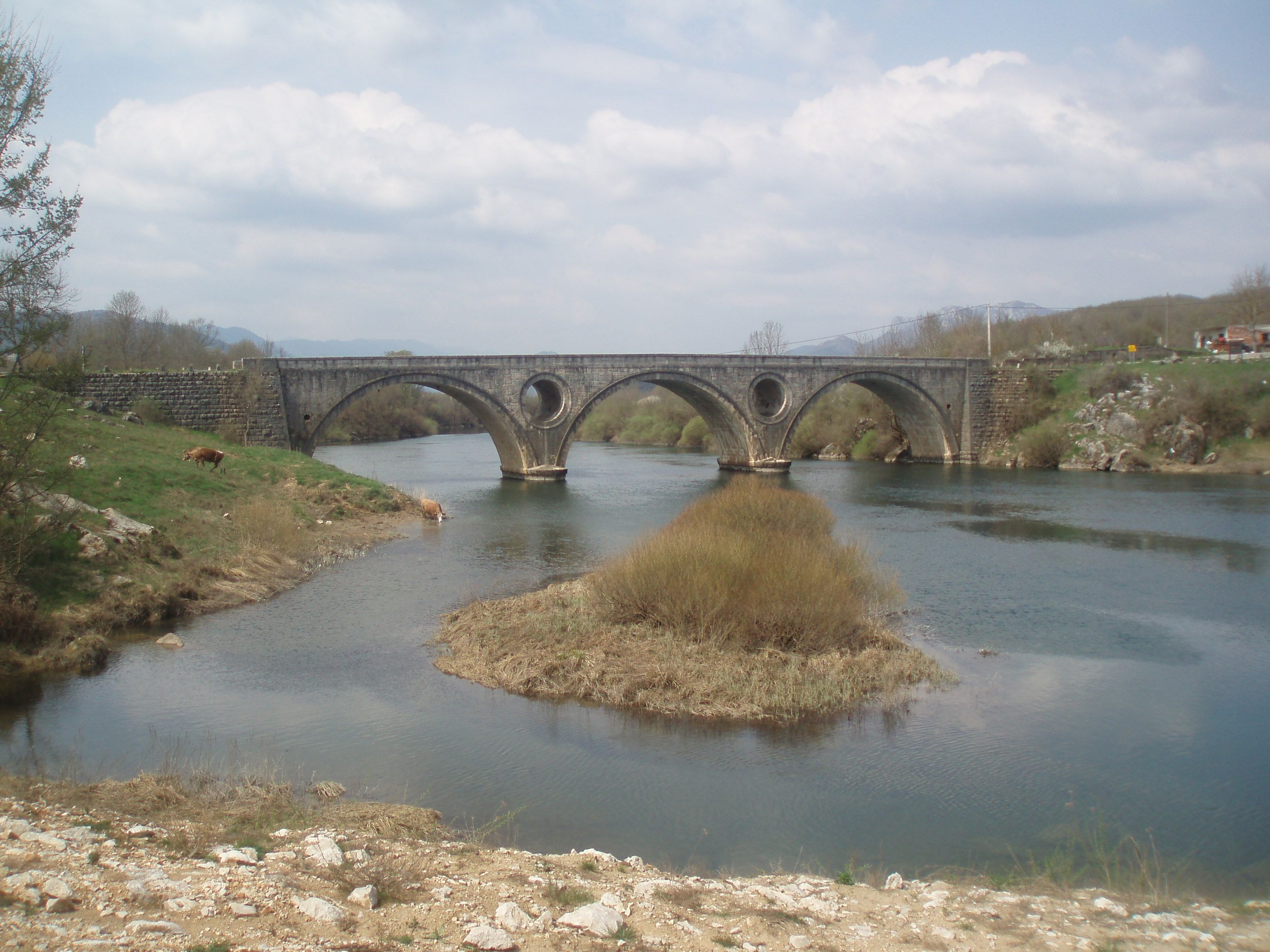 Rijeka Lika i Kosinjski most